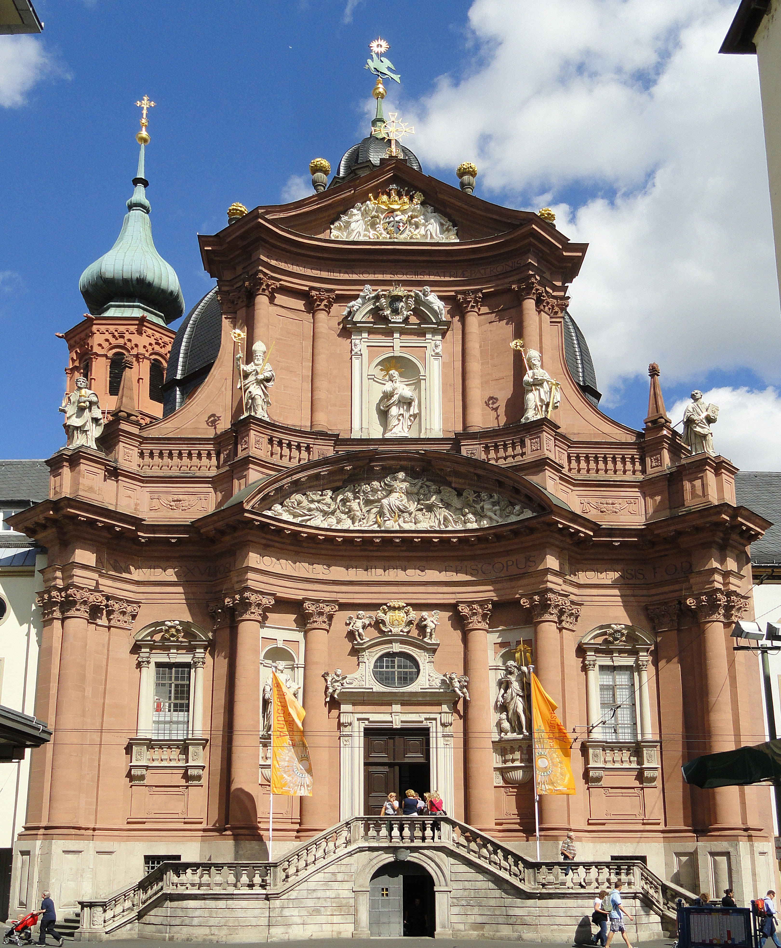 Neumünster, Würzburg, Germany.